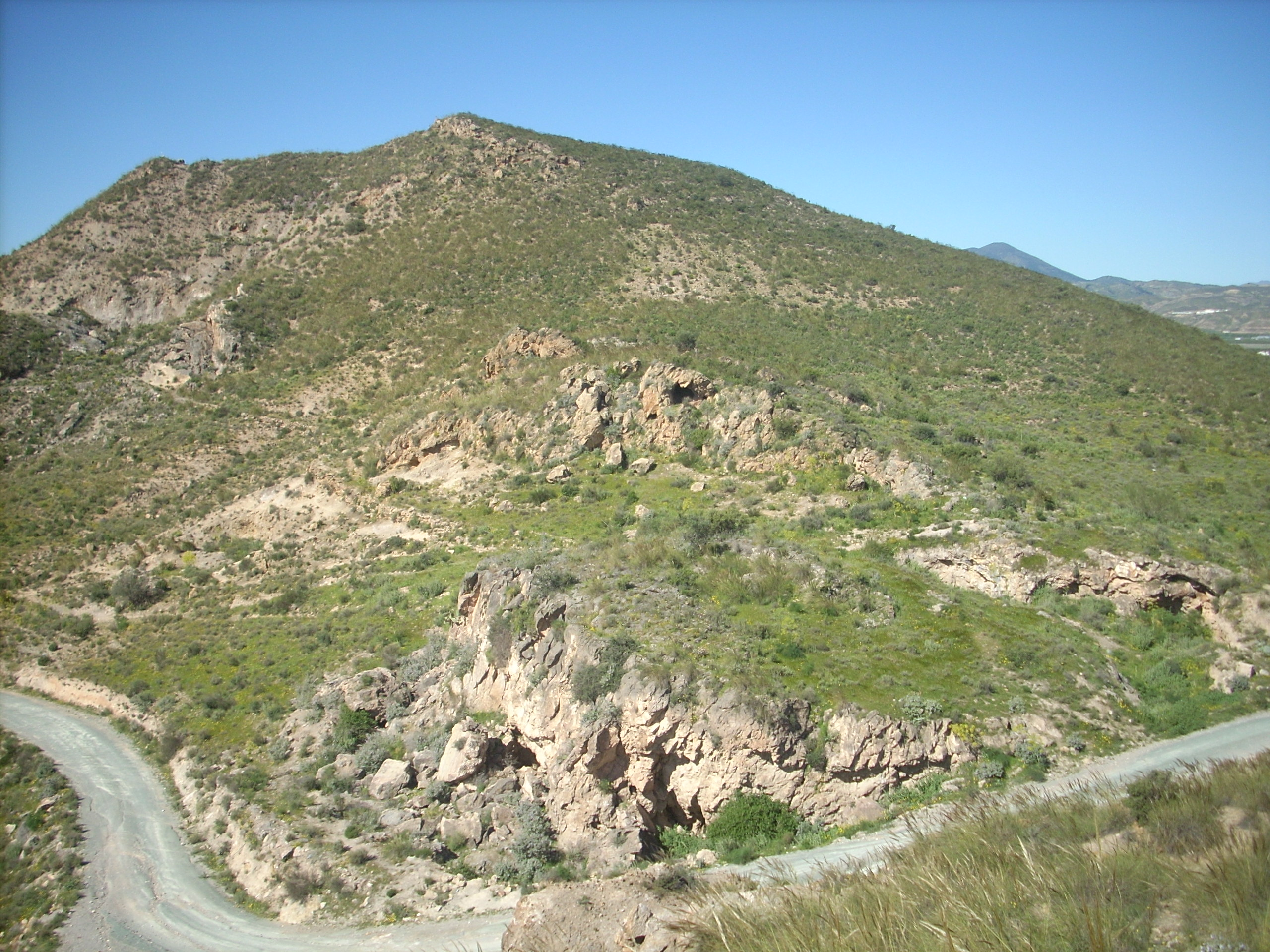 Situación del yacimiento arqueológico de Cañada Alba